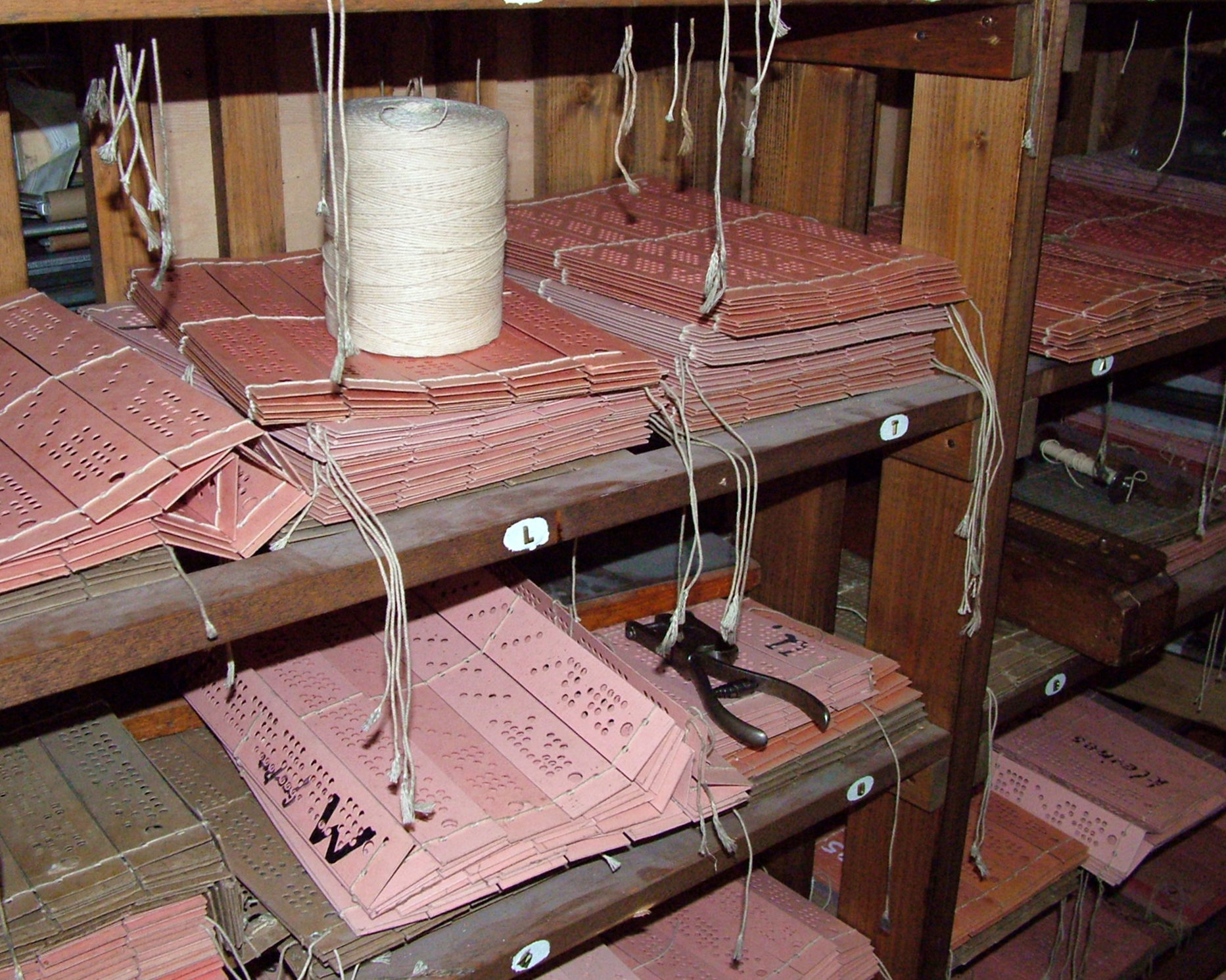 Textilmuseum Bocholt, Lochkarten für Webmaschine